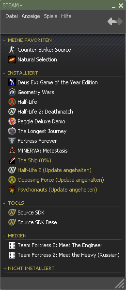 Steam-Client in Mini-Listen-Modus